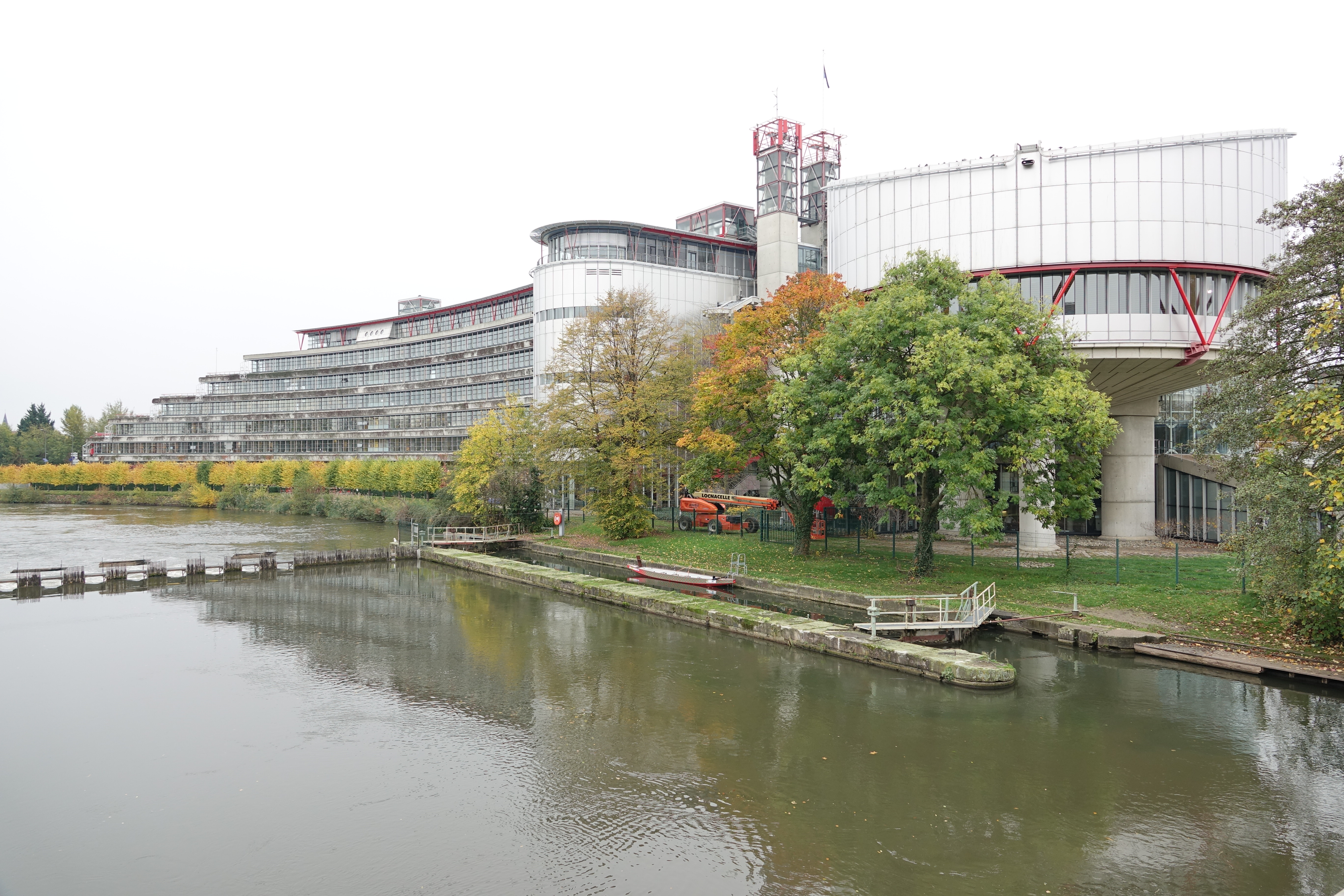 Cour européenne des droits de l'homme à Strasbourg (Bas-Rhin, France).